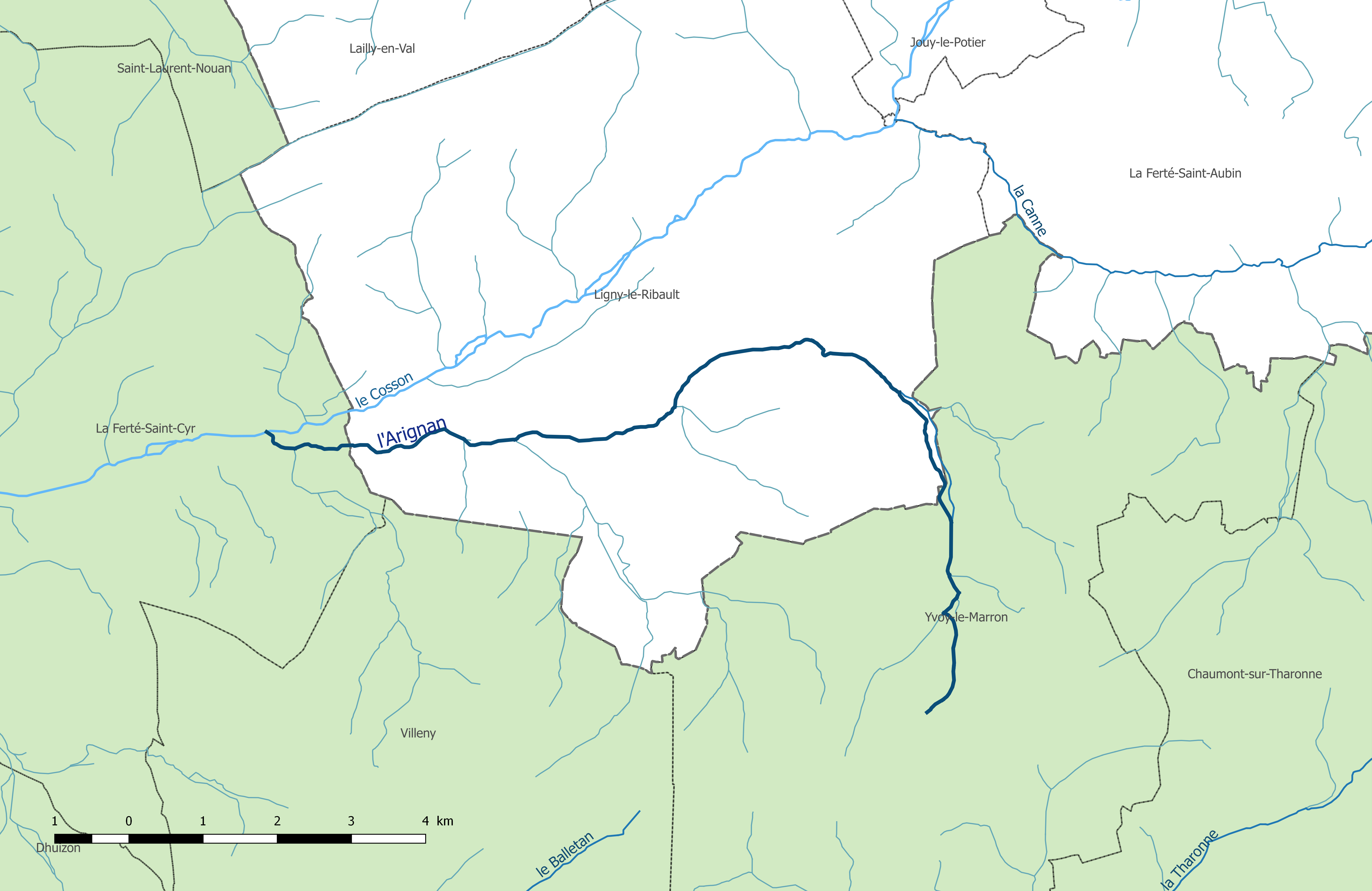 Carte du cours d'eau "l'Arignan " et de ses affluents, dans le département du Loiret.